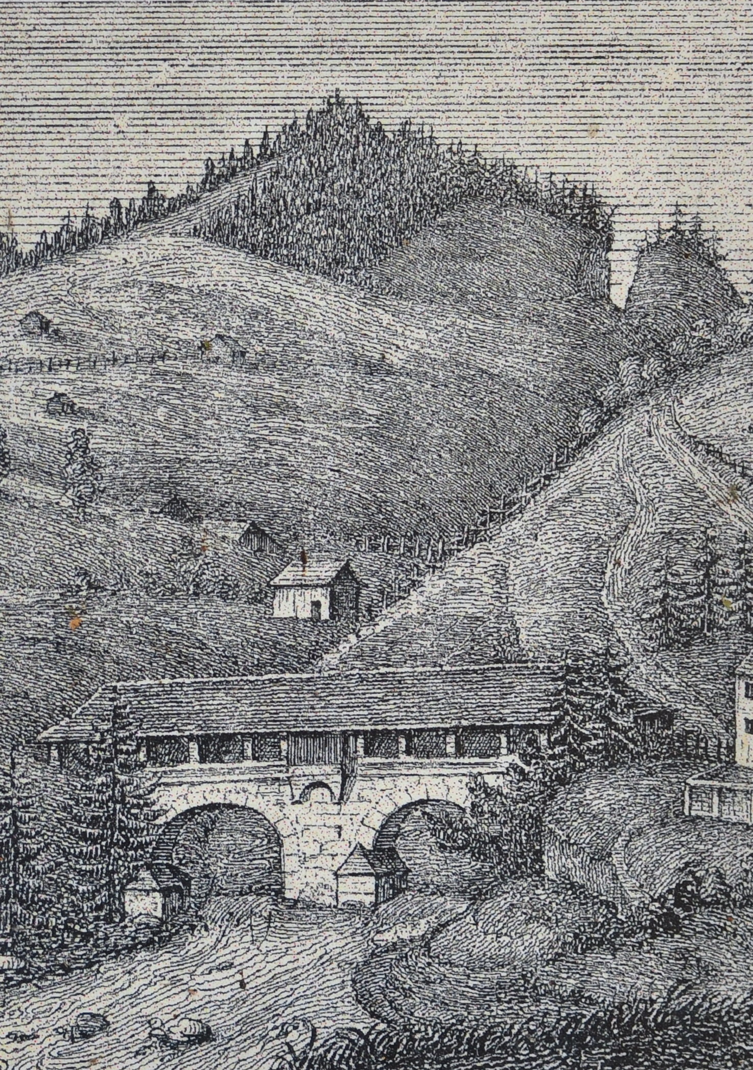 Etzel, Etzelpass und die Tüfelsbrugg über die Sihl auf einer historischen Abbildung